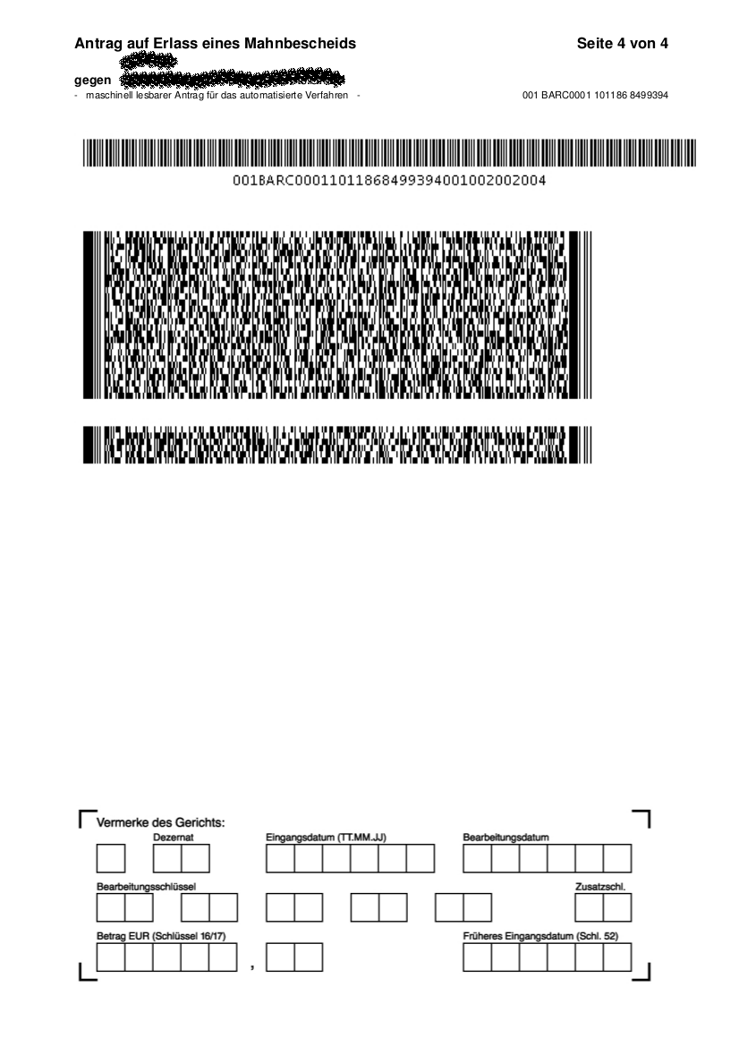 Seite 4 von 4: Antrag auf Erlass eines Mahnbescheids, "Online"-Version, Adressen und einige andere Daten geschwärzt